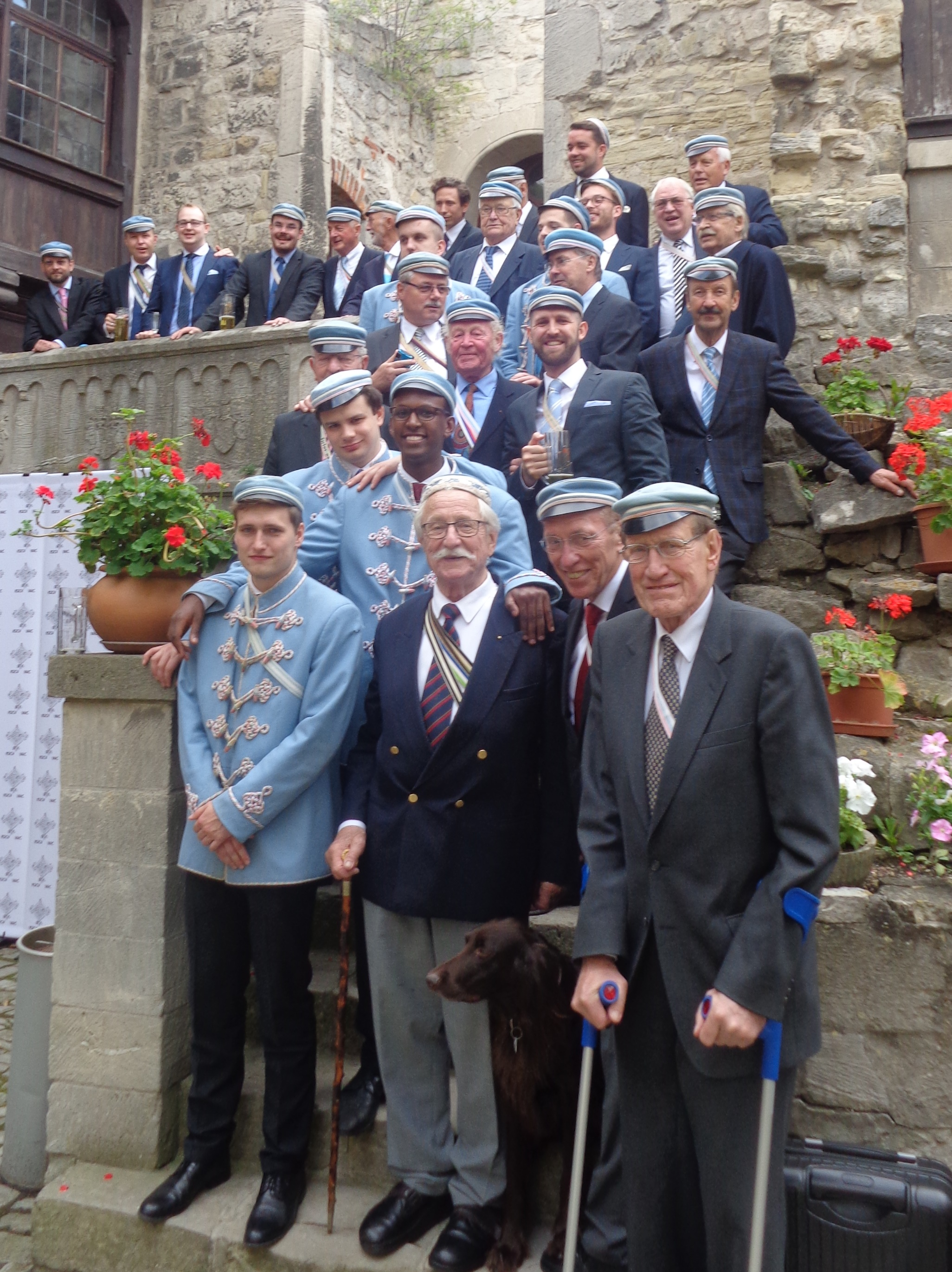 Angehörige des Corps Silesia auf der Rudelsburg